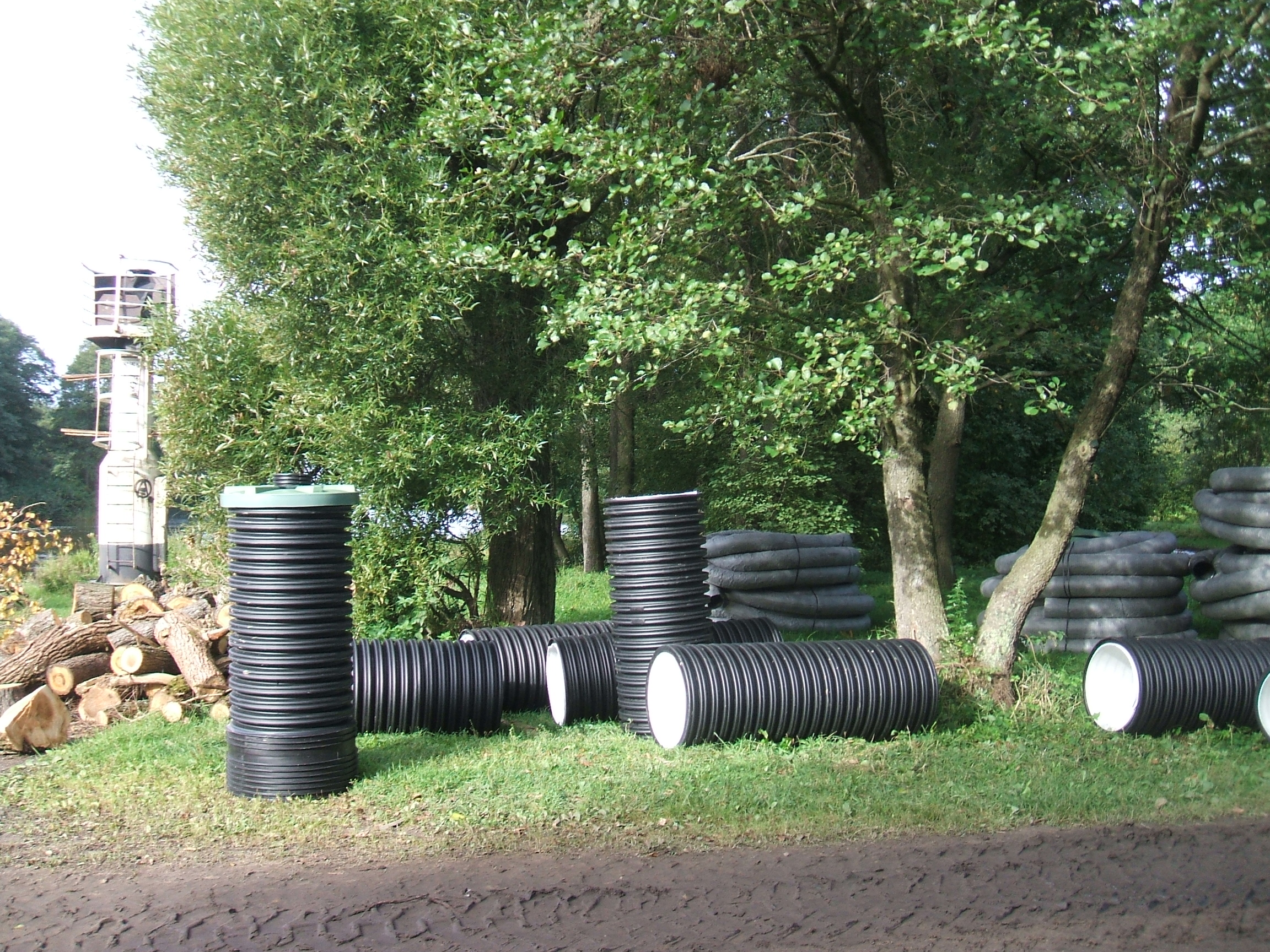 Сестрорецкие Дубки. СПб. Технические элементы подземного дренажа устроенного в парке в 2012 году.